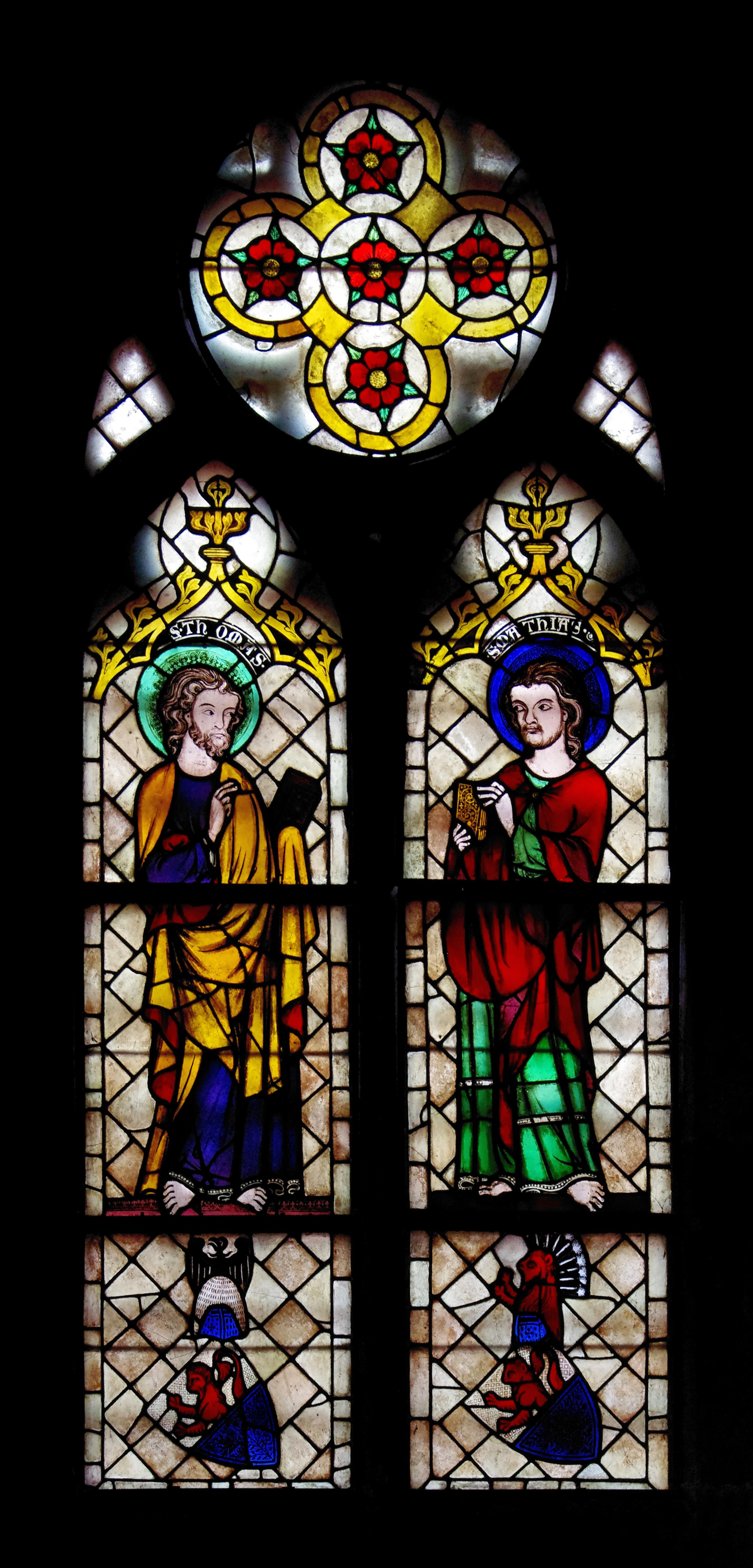 Fenster im Endinger Chörlein des Freiburger Münsters, Apostel Thomas + Matthias, darunter Wappen der Herren von Endingen mit Helmzieren (um 1321)